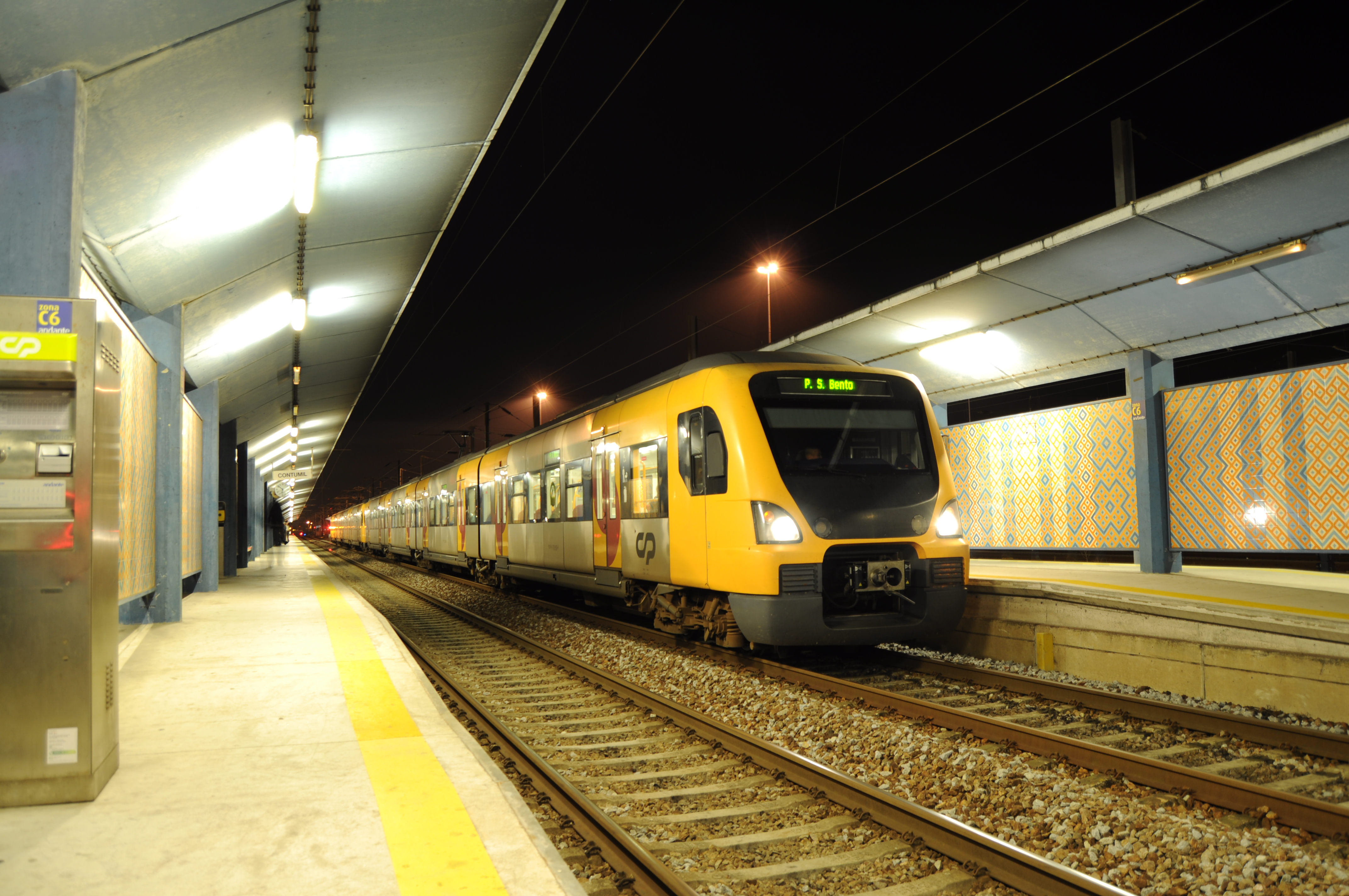 CP 3400 - Contumil